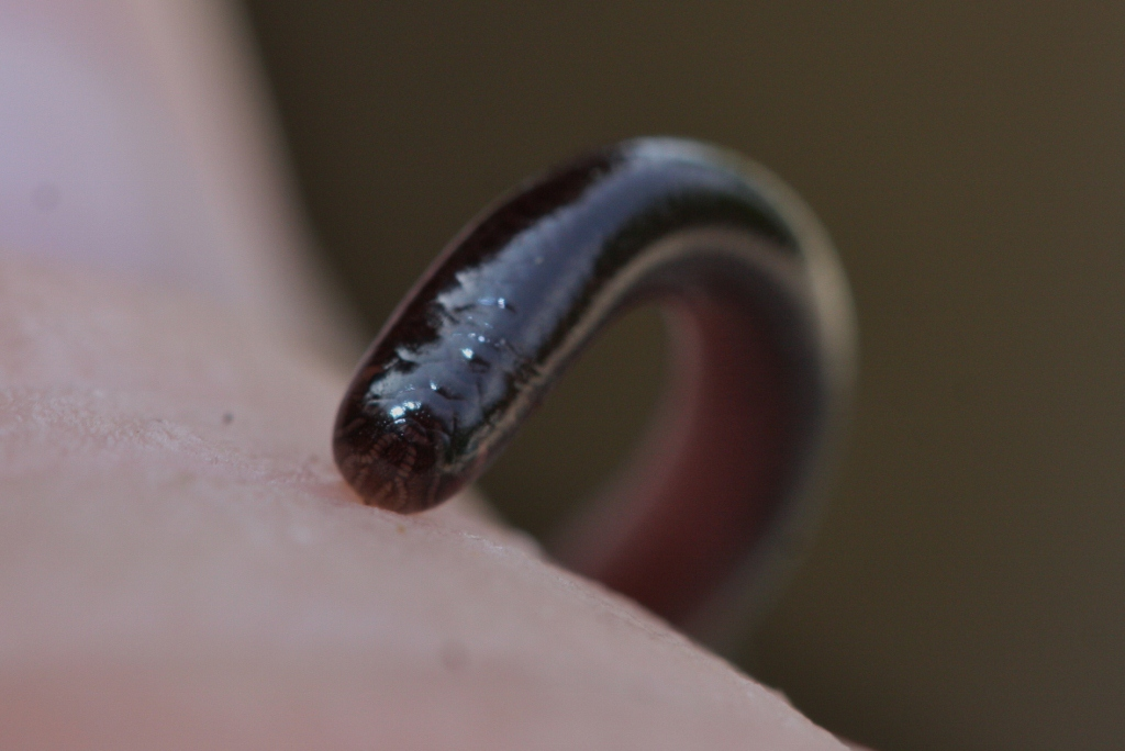 Taken near Ho Chung, Sai Kung.